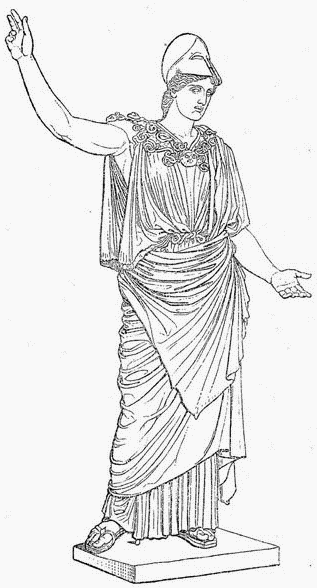 Athene